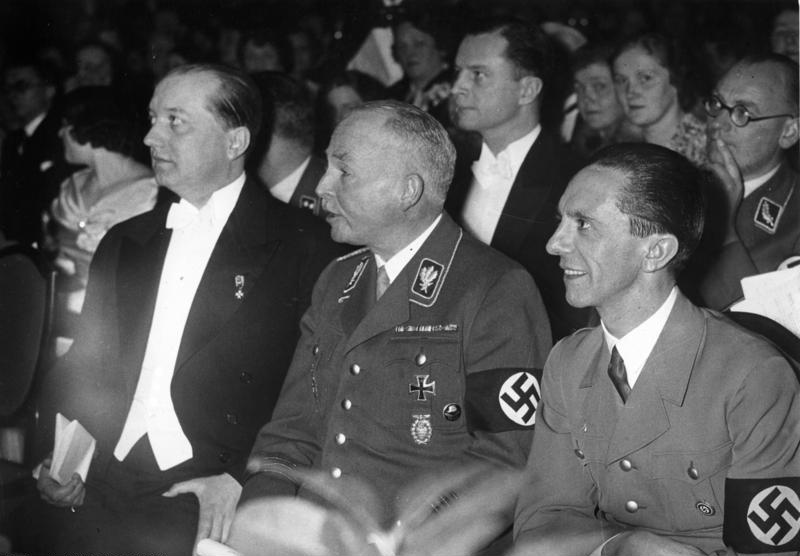 Eröffnung des Deutsch-Polnischen Instituts Festkonzert anläßlich der Eröffnung des Deutsch-Polnischen Instituts an der Lessinghochschule im Marmorsaal des Zoos. Von links: Polnischer Botschafter Exc. Dr. Lipski, Herzog von Sachsen-Coburg-Gotha, Reichsminister Dr. Josef Goebbels. Hs. 7275-35, 26. Februar 1935 [Herausgabedatum] Abgebildete Personen: Sachsen-Coburg und Gotha, Karl-Eduard von: 1884-1954, Herzog, Präsident des Deutschen Roten Kreuzes, Deutschland Goebbels, Joseph: Reichsminister für Volksaufklärung und Propaganda, Gauleiter Berlin, Deutschland Lipski, Josef: Gesandter in Deutschland, Polen